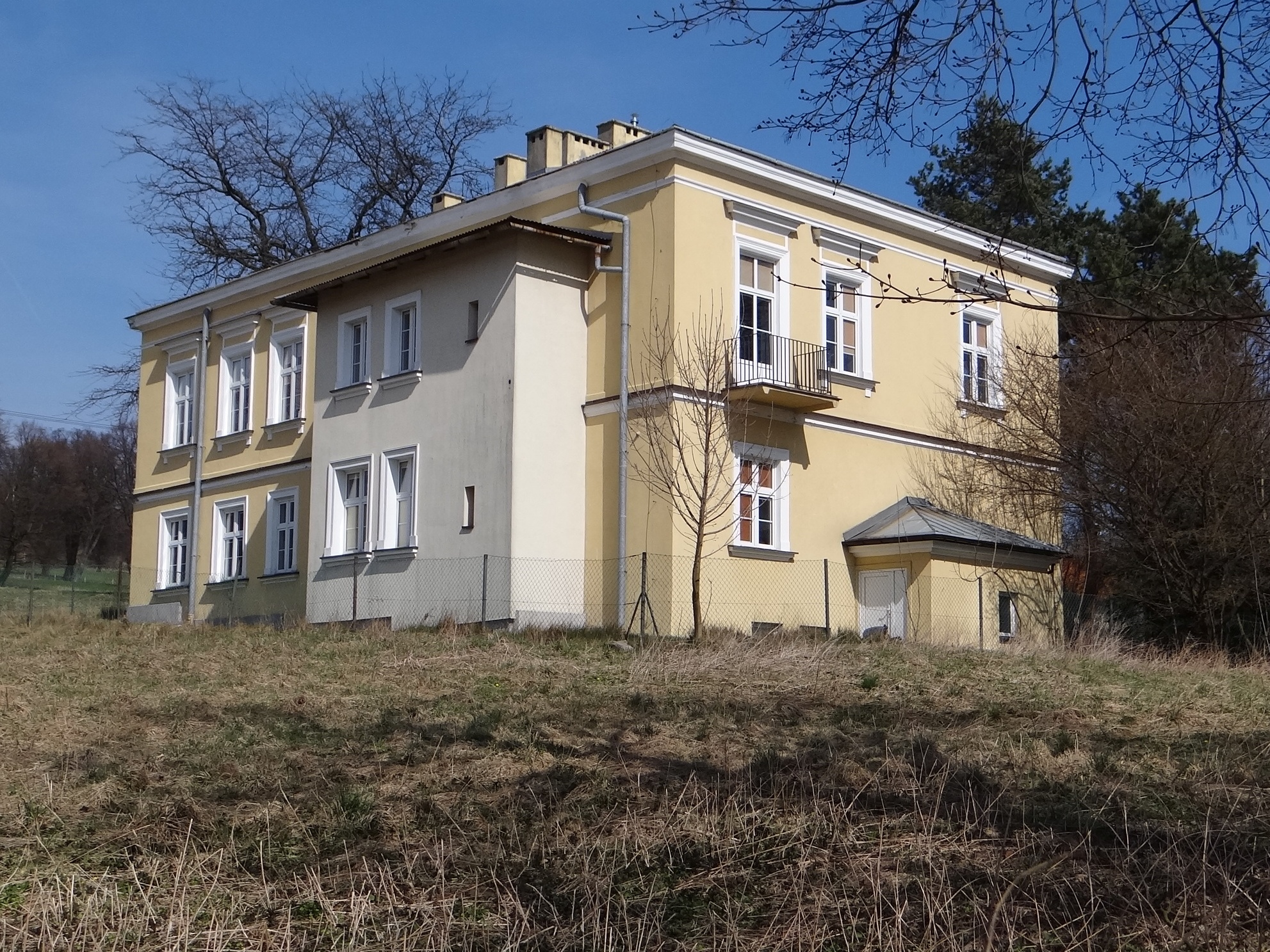 Dawny dwór w Aleksandrowicach